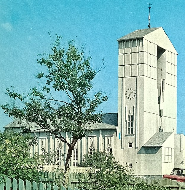 Vadsø kirke